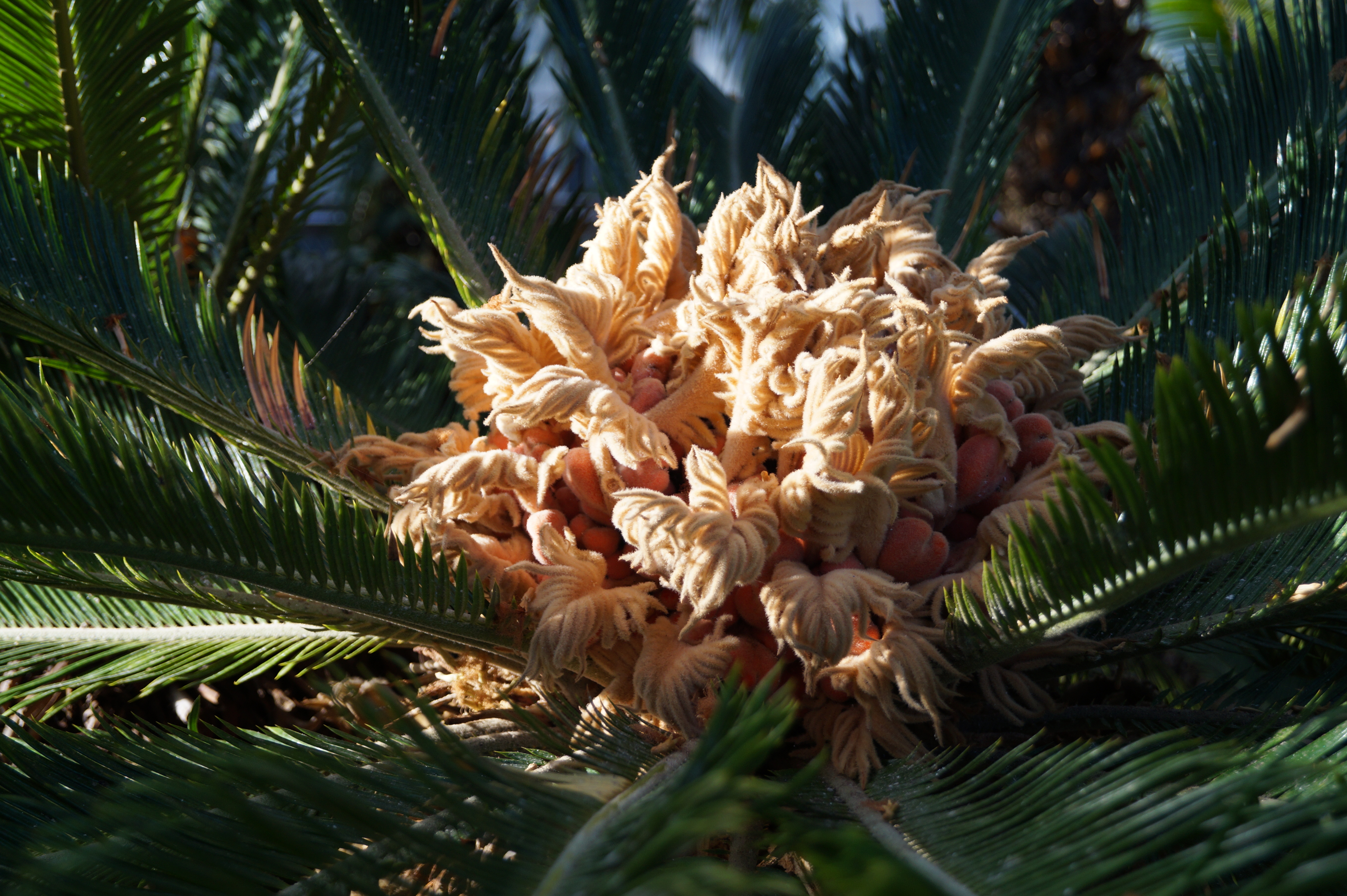 Der Botanische Garten am Institut für Pflanzenwissenschaften der Karl-Franzens-Universität Graz befindet sich im dritten Grazer Stadtbezirk Geidorf. Die aktuell im Betrieb befindlichen neuen Gewächshäuser bestehen aus dem Warmhaus, dem Kalthaus, dem Temperierthaus und dem Sukkulentenhaus.